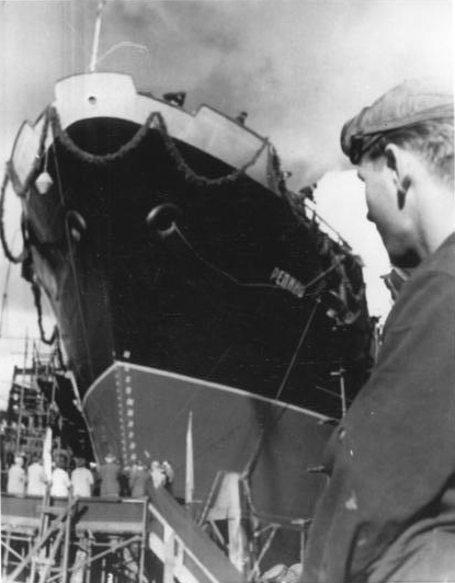 Zentralbild-Mellahn 30.9.1960 ADN-Telebild FS-Qu. Rostock: Schiff für Sowjetunion nach 81 Tagen fertiggestellt. Nach einer Bauzeit von nur 81 Tagen lief am 30.9.1960 das 61. Schiff einer für den Export in die Sowjetunion bestimmten 4 500-Tonnen-Serie in der Rostocker Neptunwerft vom Stapel. Bisher wurden für den Schiffskörperbau dieser Serie durchschnittlich 180 Tage benötigt. Der 122 Meter lange Frachter, der den Namen "Repino" erhielt, wird noch am Ende dieses Jahres planmäßig den Aussenhandelsorganen der Sowjetunion übergeben."